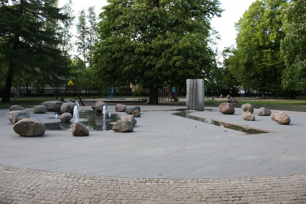 Falgi park Tallinnas.